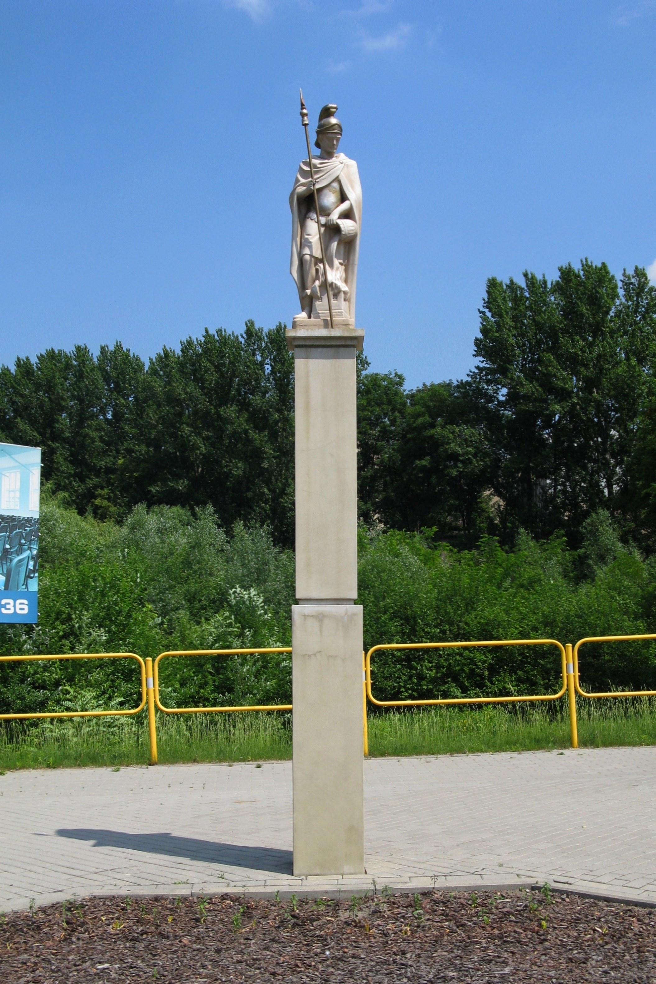 figura św. Floriana u zbiegu ul. Nomiarki i 75 Pułku Piechoty w Chorzowie, poświęcona 4 maja 2016 roku przez pba Adama Wodarczyka (św. Florian od 19 października 1993 roku jest oficjalnym patronem Chorzowa)